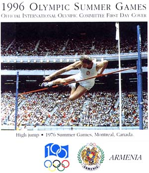 Jacek Wszoła